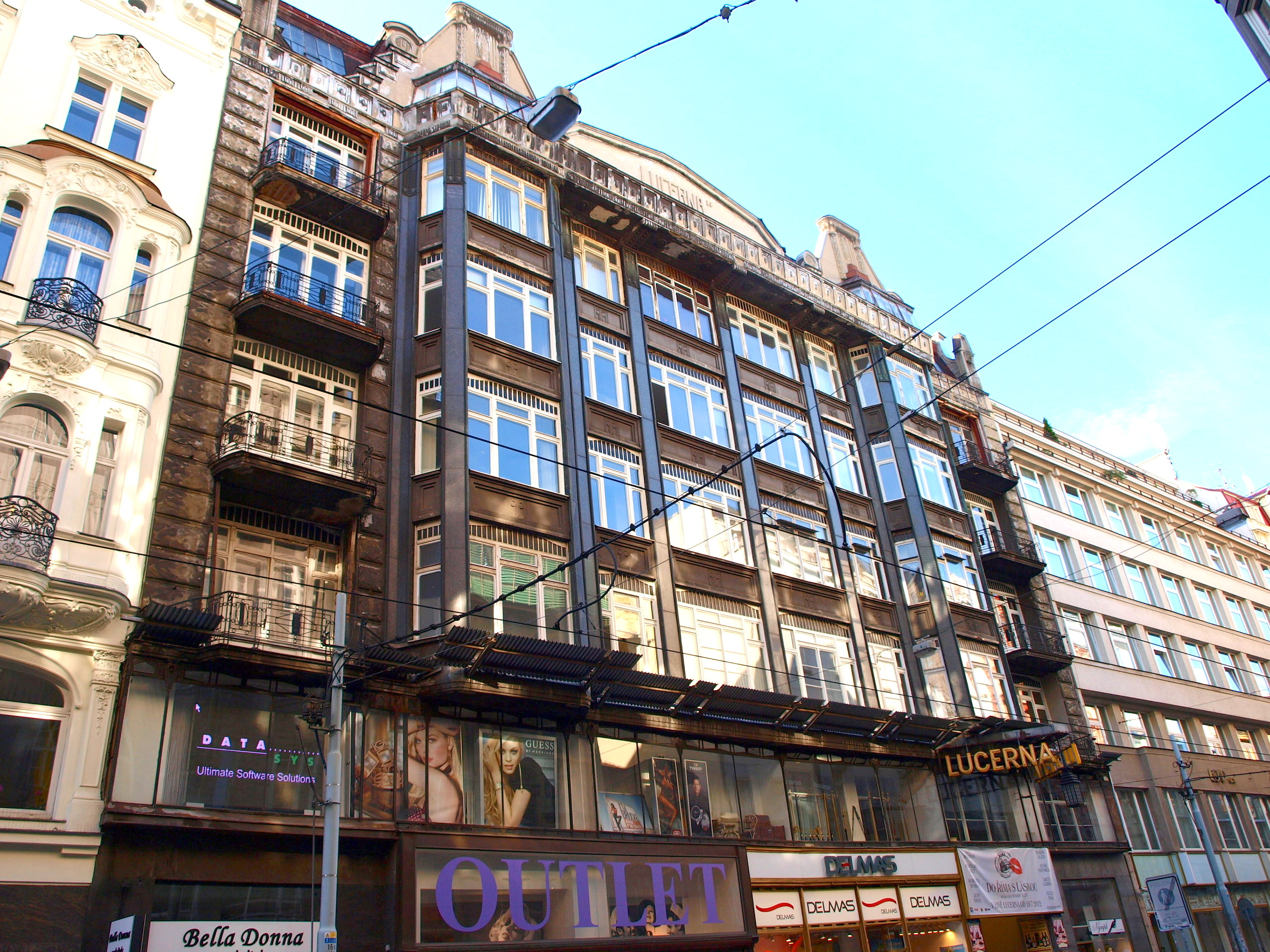 Palác Lucerna Praha